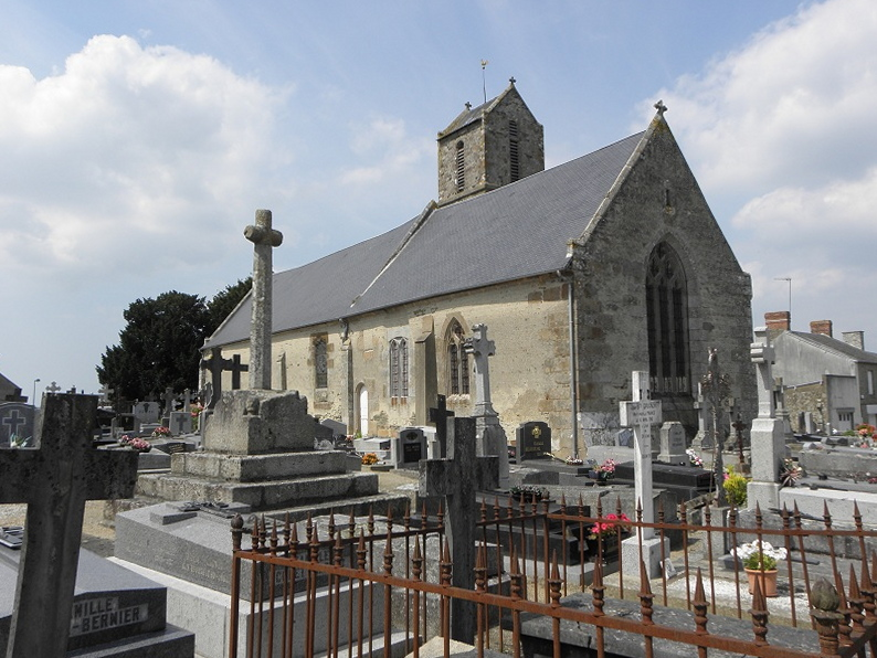 Église Saint-Cyr et Sainte-Julitte à Céaux (50).